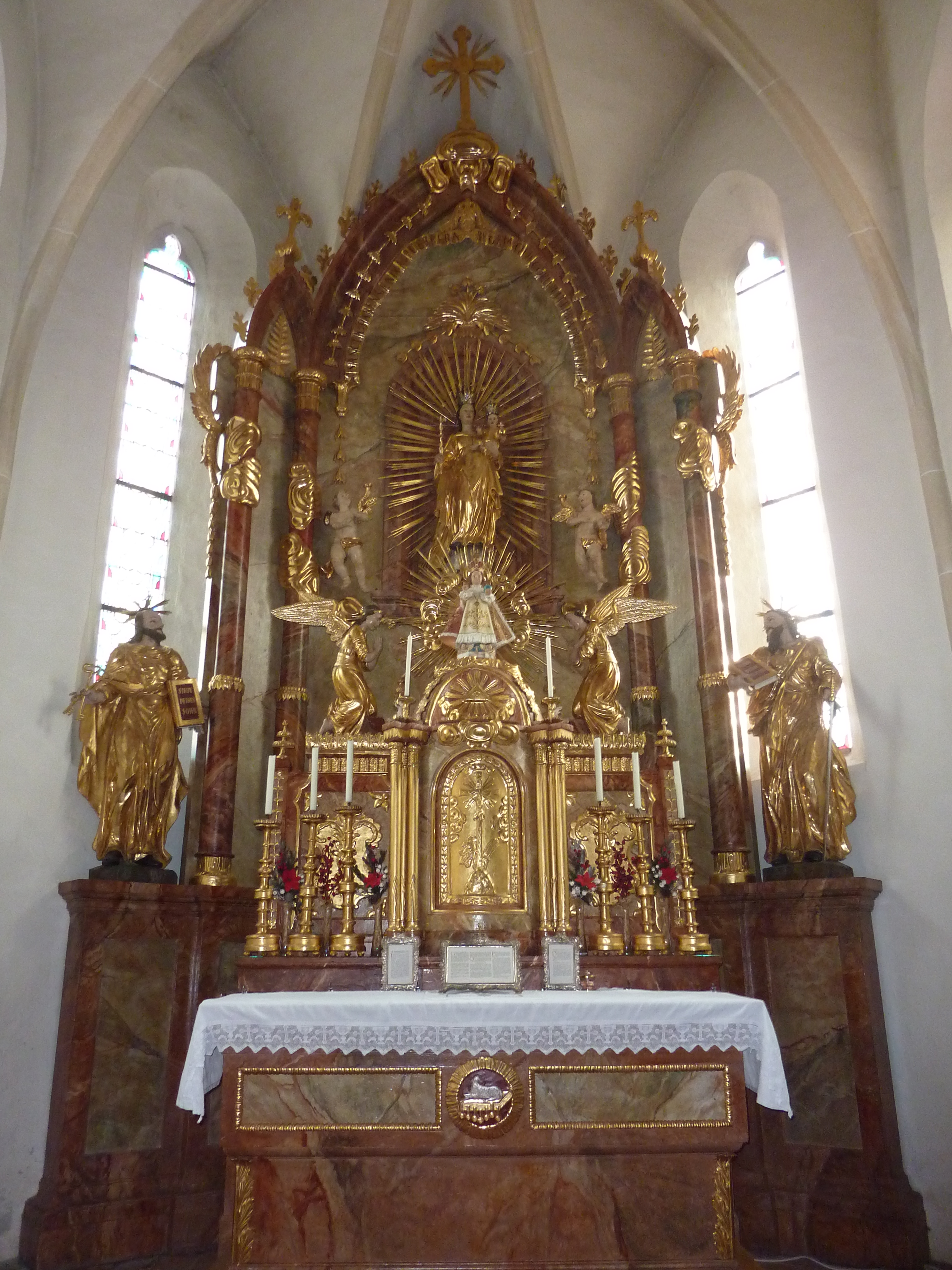 Pfarrkirche Kottes, Niederösterreich - klassizistischer Hochaltar mit Gnadenbild „Maria Berg im Tale“, flankiert von Statuen hll. Petrus und Paulus